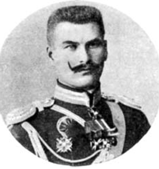 Николай Семёнович Анисимов (18 декабря 1877, Оренбургская губерния — 8 апреля 1931, Москва) — генерал-майор, представитель Союза казачьих войск в Ставке (1917), кандидат в делегаты Учредительного собрания; бежал в СССР после растраты войсковой кассы (1923).